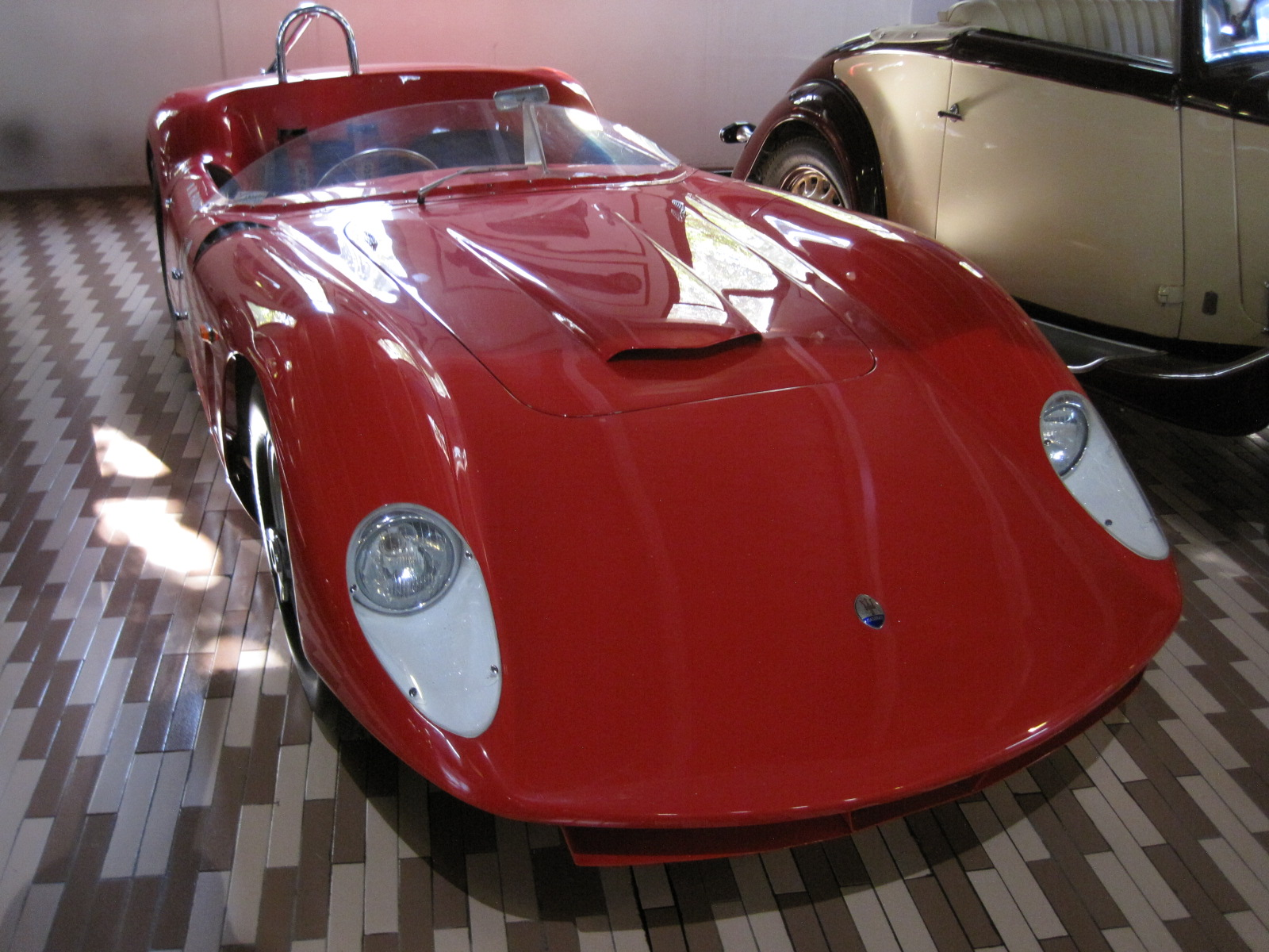 Automobiles in Panini Maserati Museum in Modène